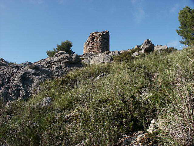 Torre de na Seca. Escorca. Mallorca.